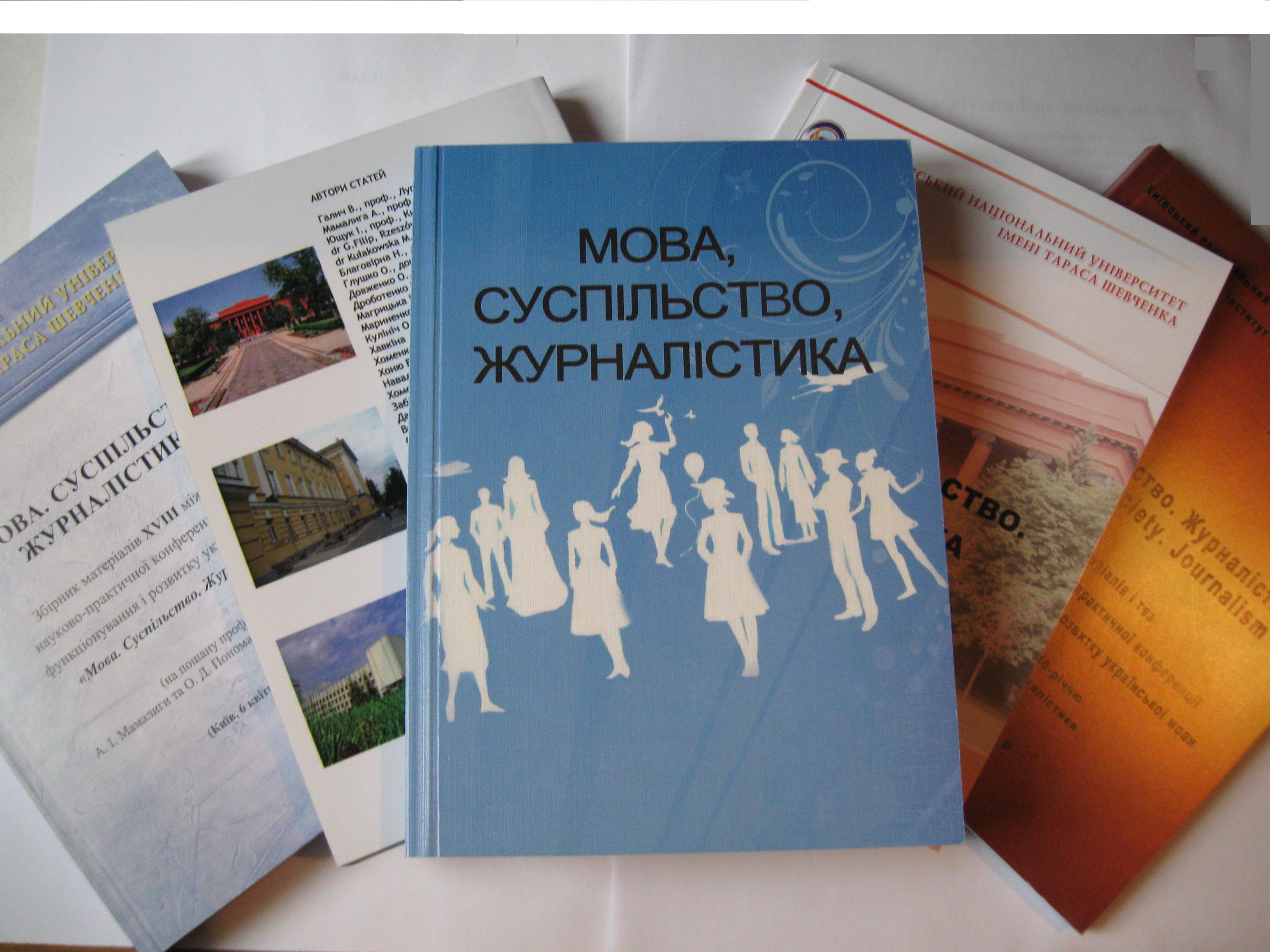 Збірники матеріалів і тез щорічних наук. конференцій Мова. Суспільство. Журналістикa (конференція)